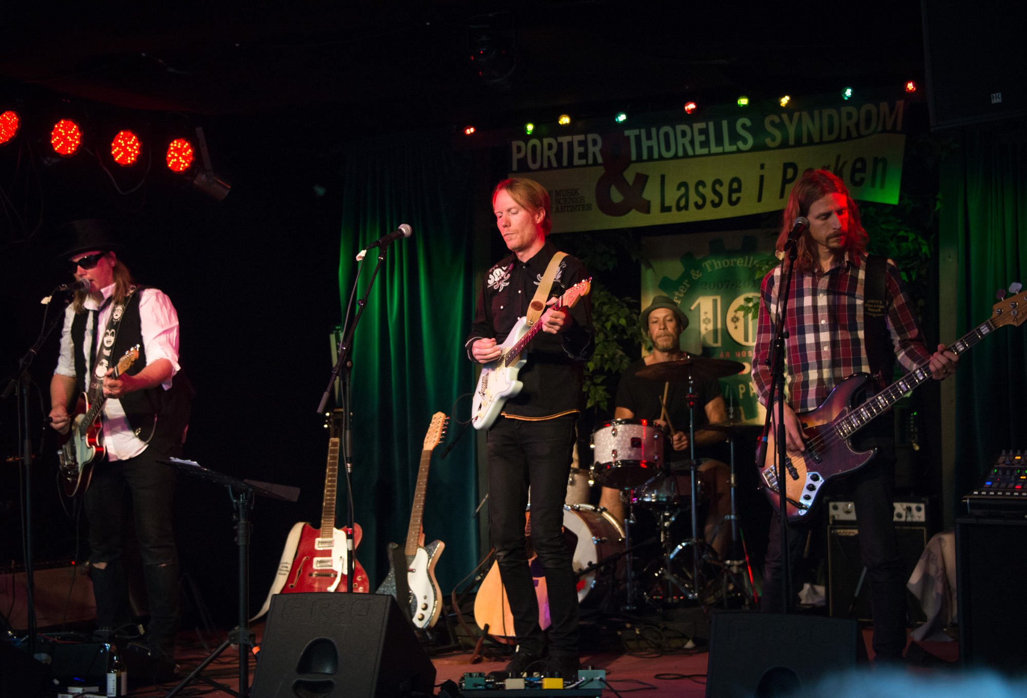 The Virtues i Lasse i Parken på Söder den 21 juli 2017.